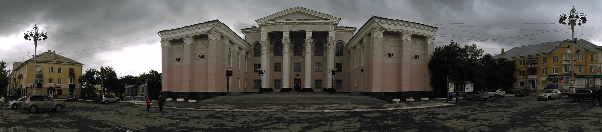 Дворец культуры и техники Северского Трубного Завода, город Полевской, лето 2014